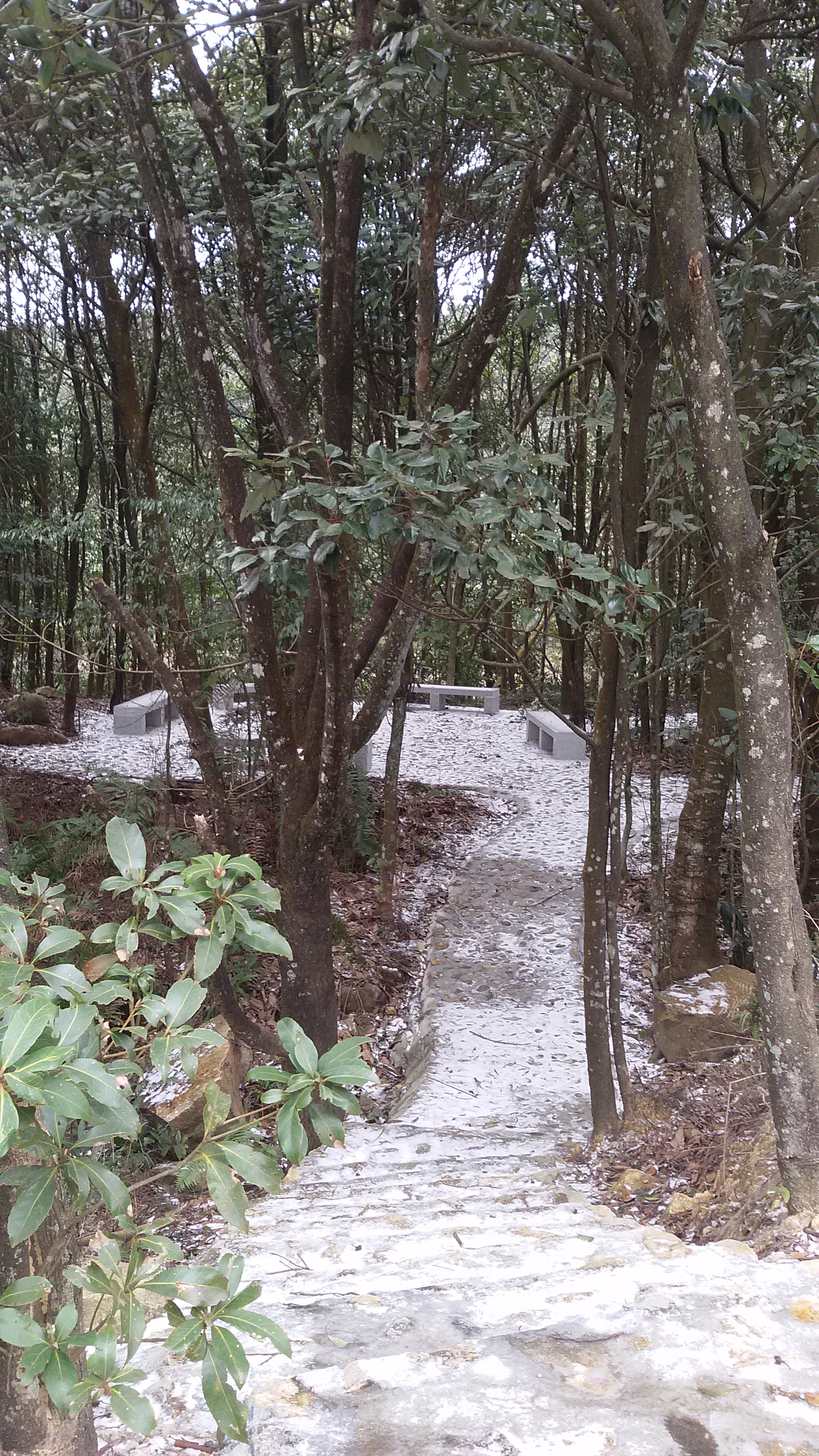 粵語: 冬天時嘅石門國家森林公園，可以見到白雪紛飛嘅情景，地面重鋪滿積雪。